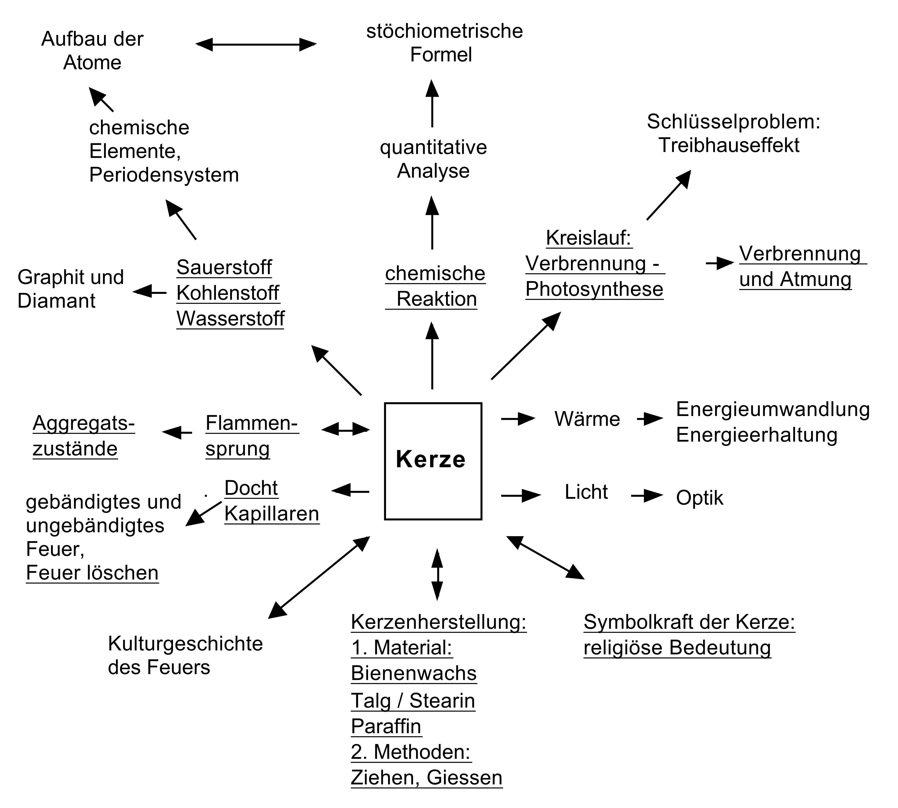 "Thematische Landkarte" des auf Martin Wagenschein basierenden Lehrstücks "Faradays Kerze" (1999)